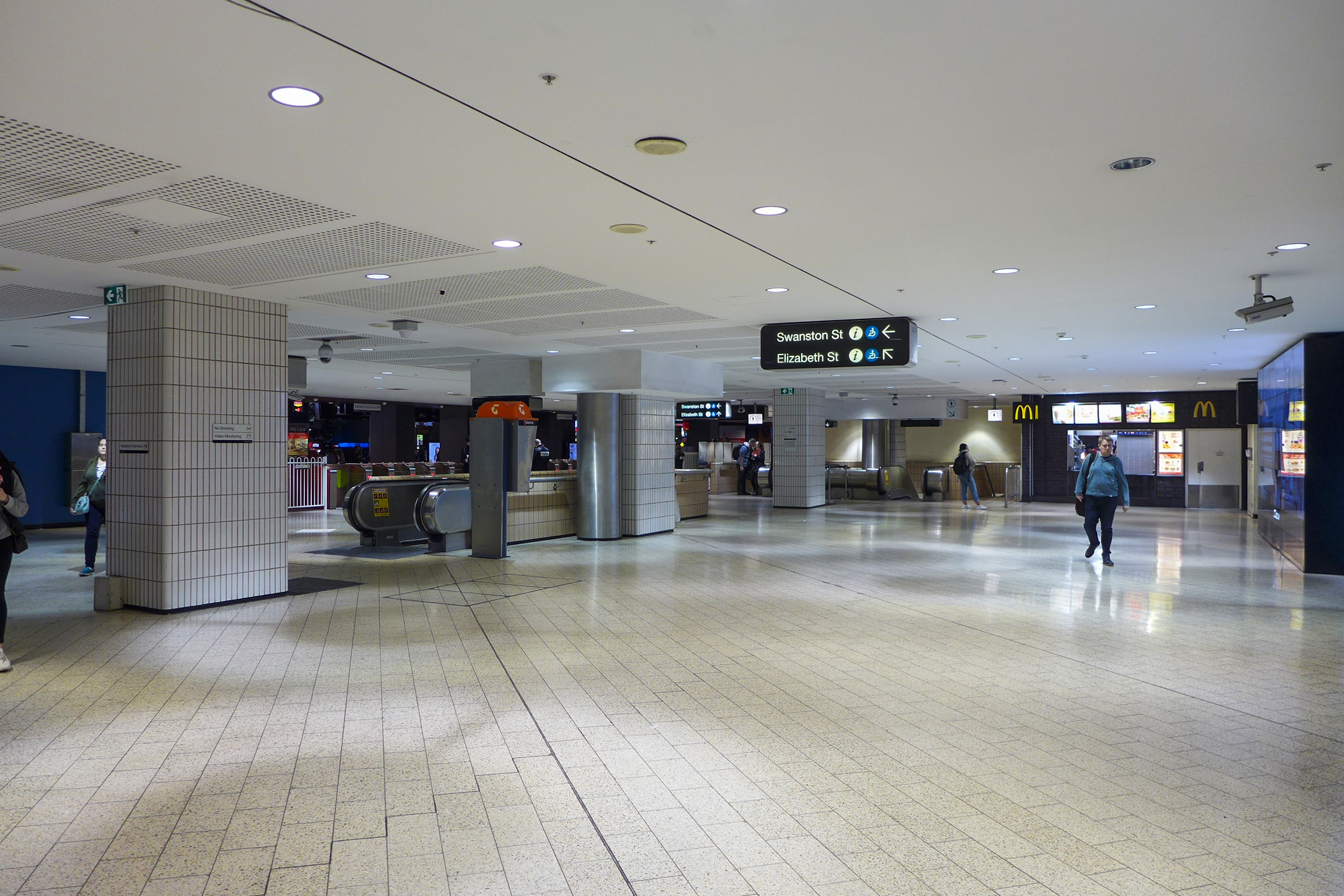 Melbourne Central Station Concourse